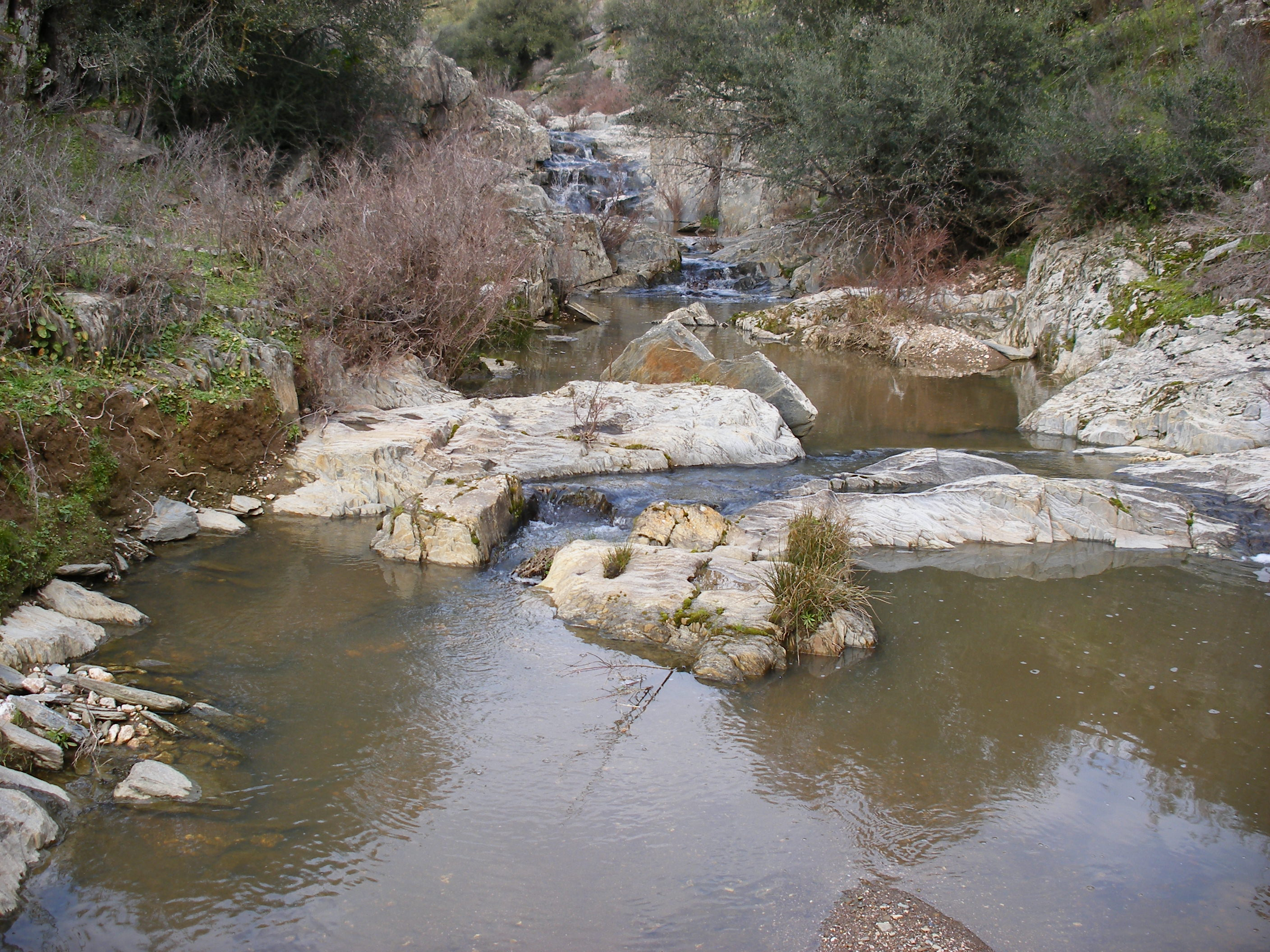 Paisaje situado en los riberos del río Almonte, Talaván (Cáceres)